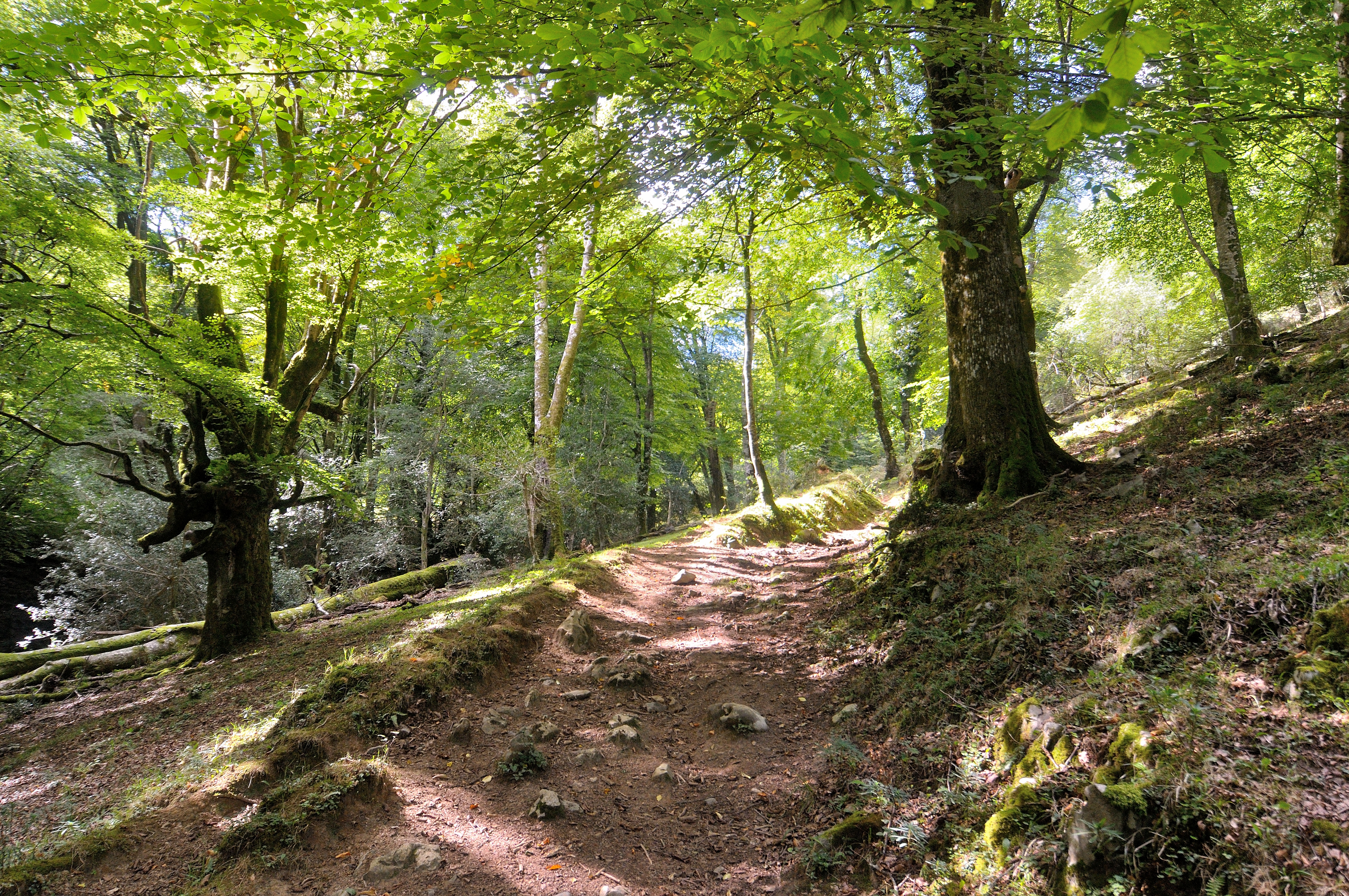 Hayedo de la Biescona, Asturias